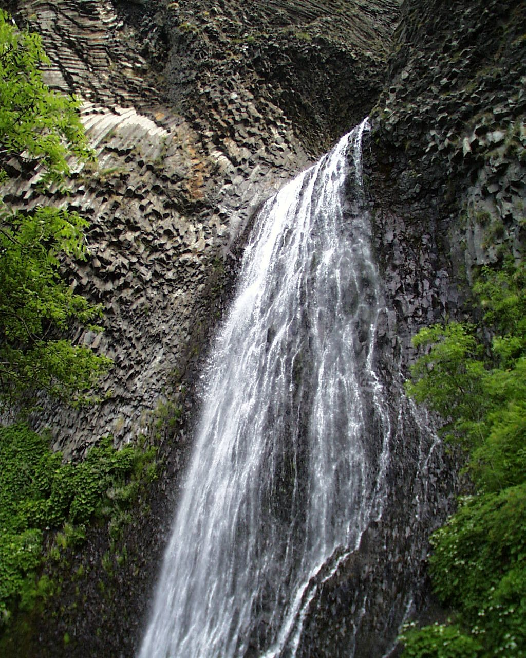 Photographie de la cascade du Ray Pic